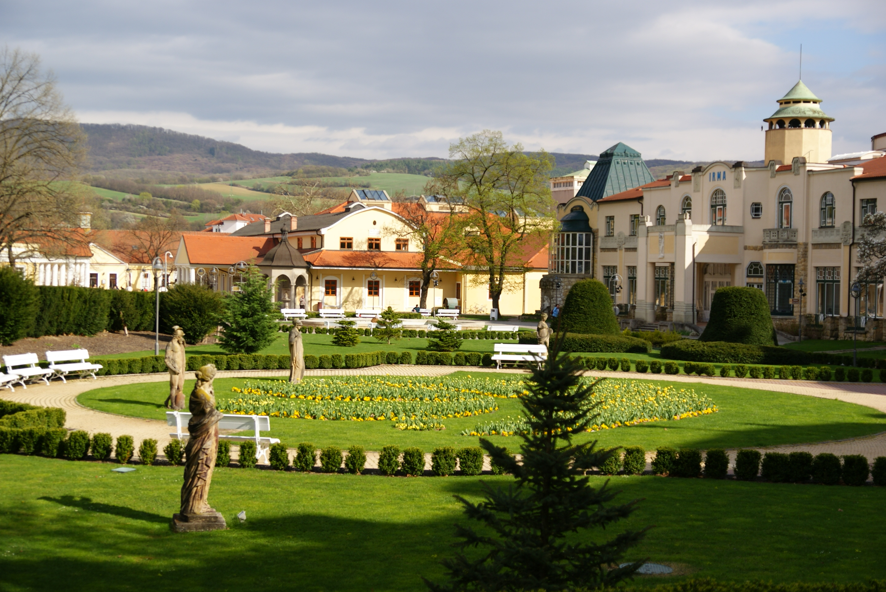 PARK